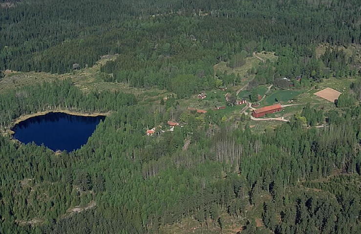 Tivedsby till höger, Nordhultasjön till vänster. Motiv: Västra och Östra Nordhult Nyckelord: Flygbilder, Riksintressen Kategori: Bondgård, SkogslandskapTivedsby till höger, Nordhultasjön till vänster.